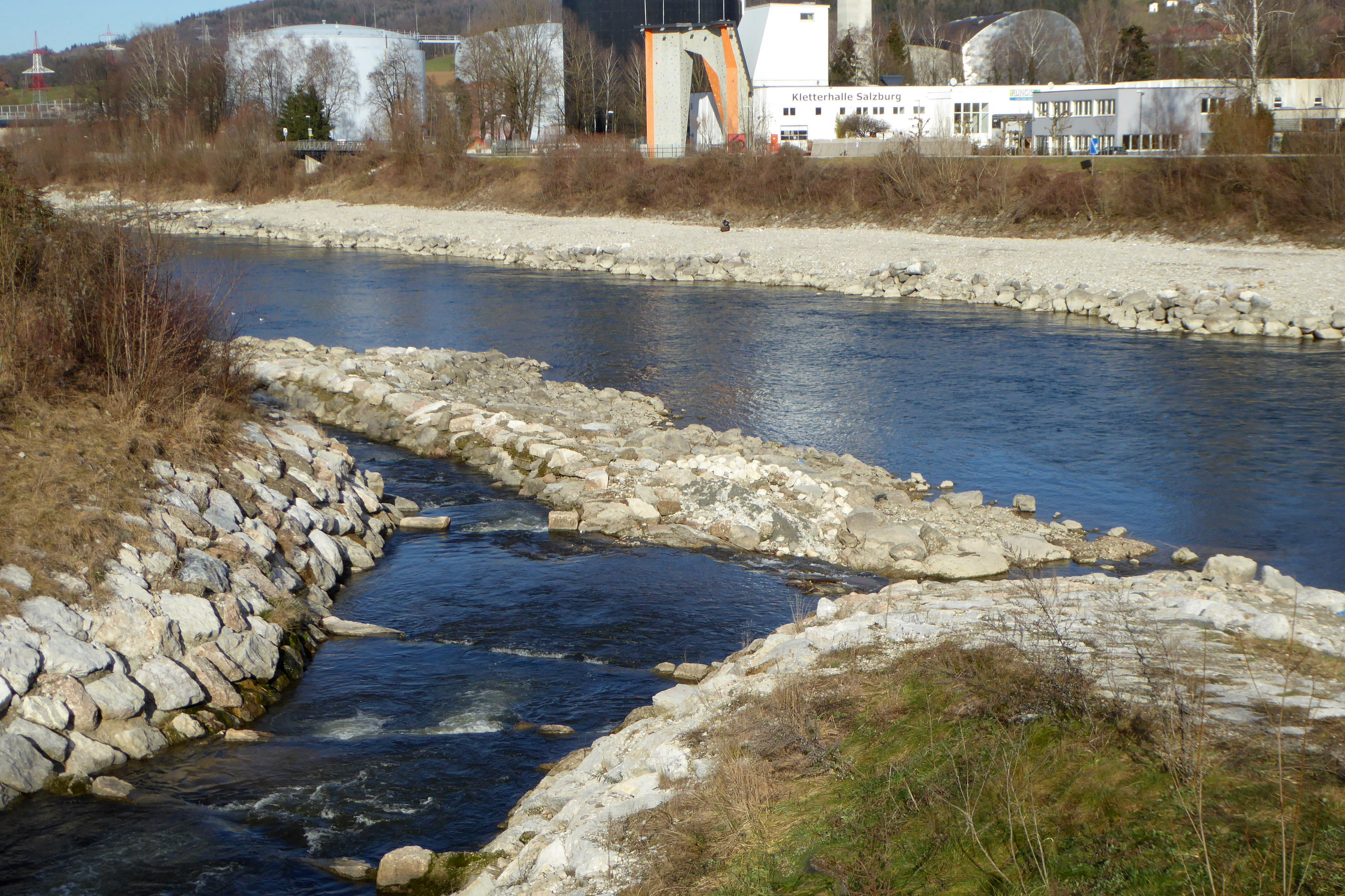 Mündung des Glankanals in die Salzach in Salzburg.